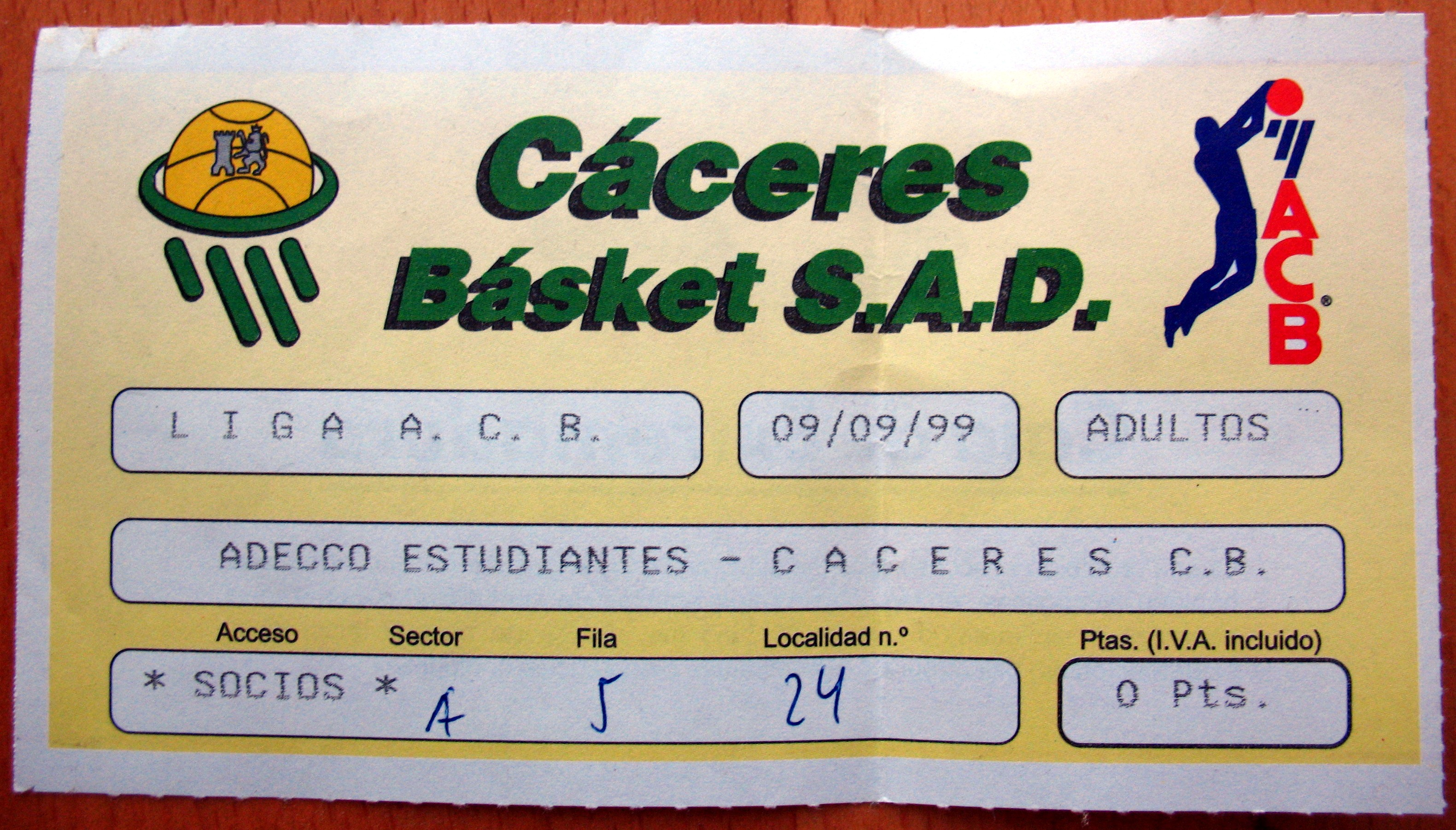 Entrada Cáceres C.B - Adecco Estudiantes temporada 99-00 de la liga ACB.